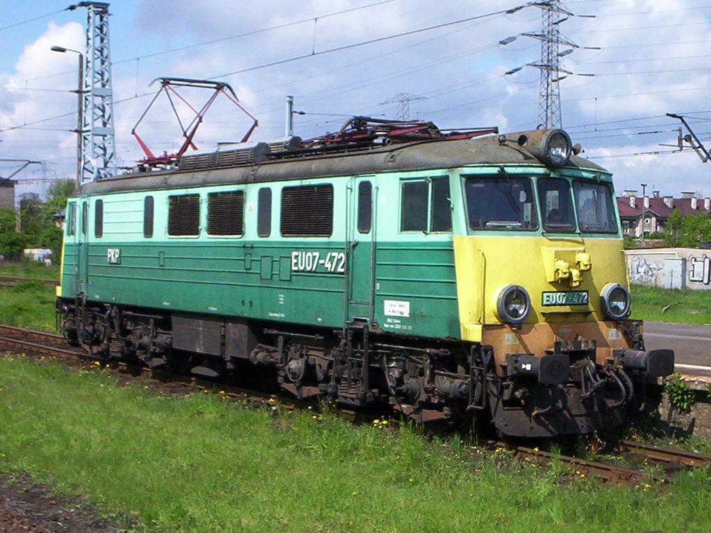 EU07-472 EU07-472 (303E) stojąca przy jednym z peronów dworca Warszawa Zachodnia